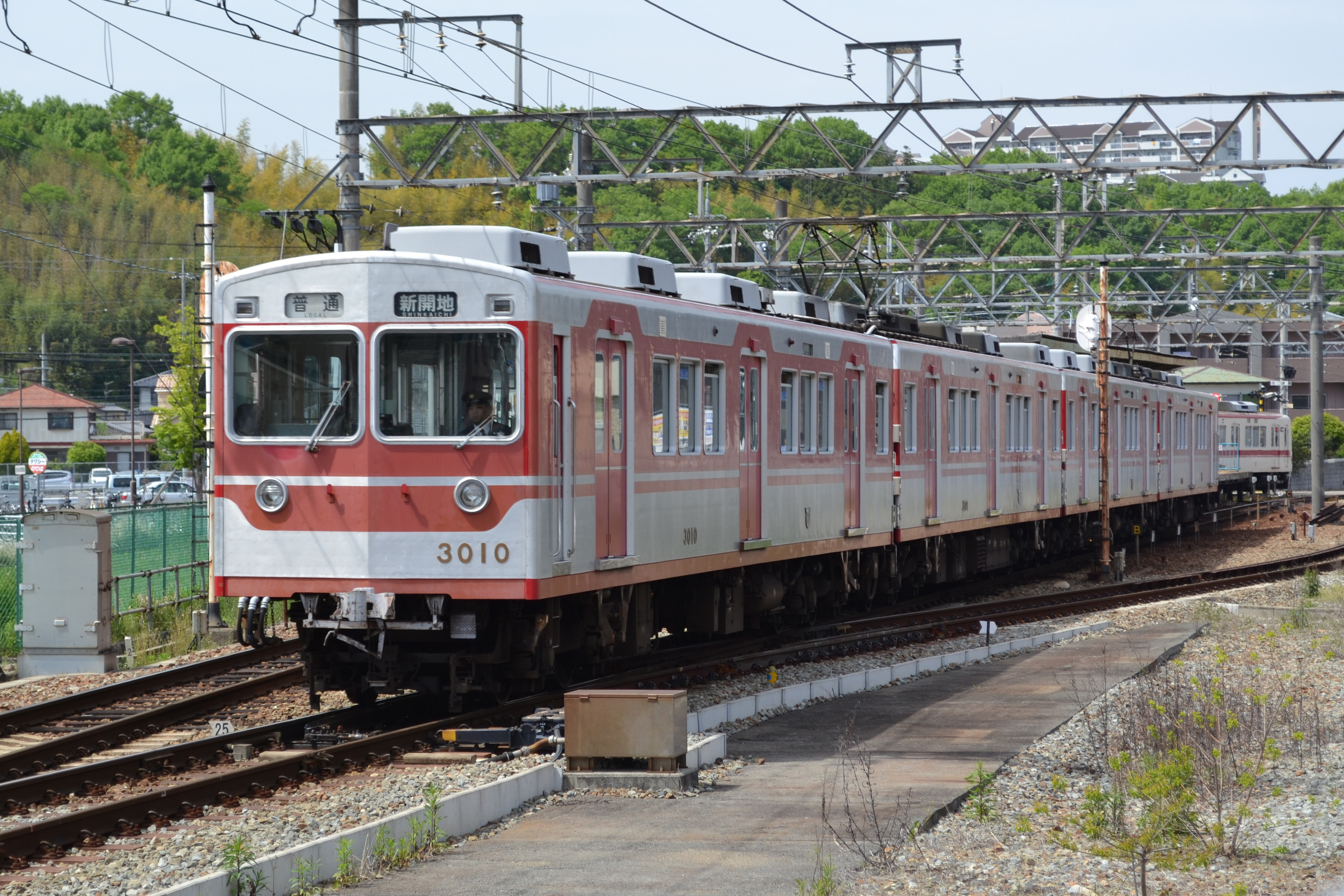 神戸電鉄3000系